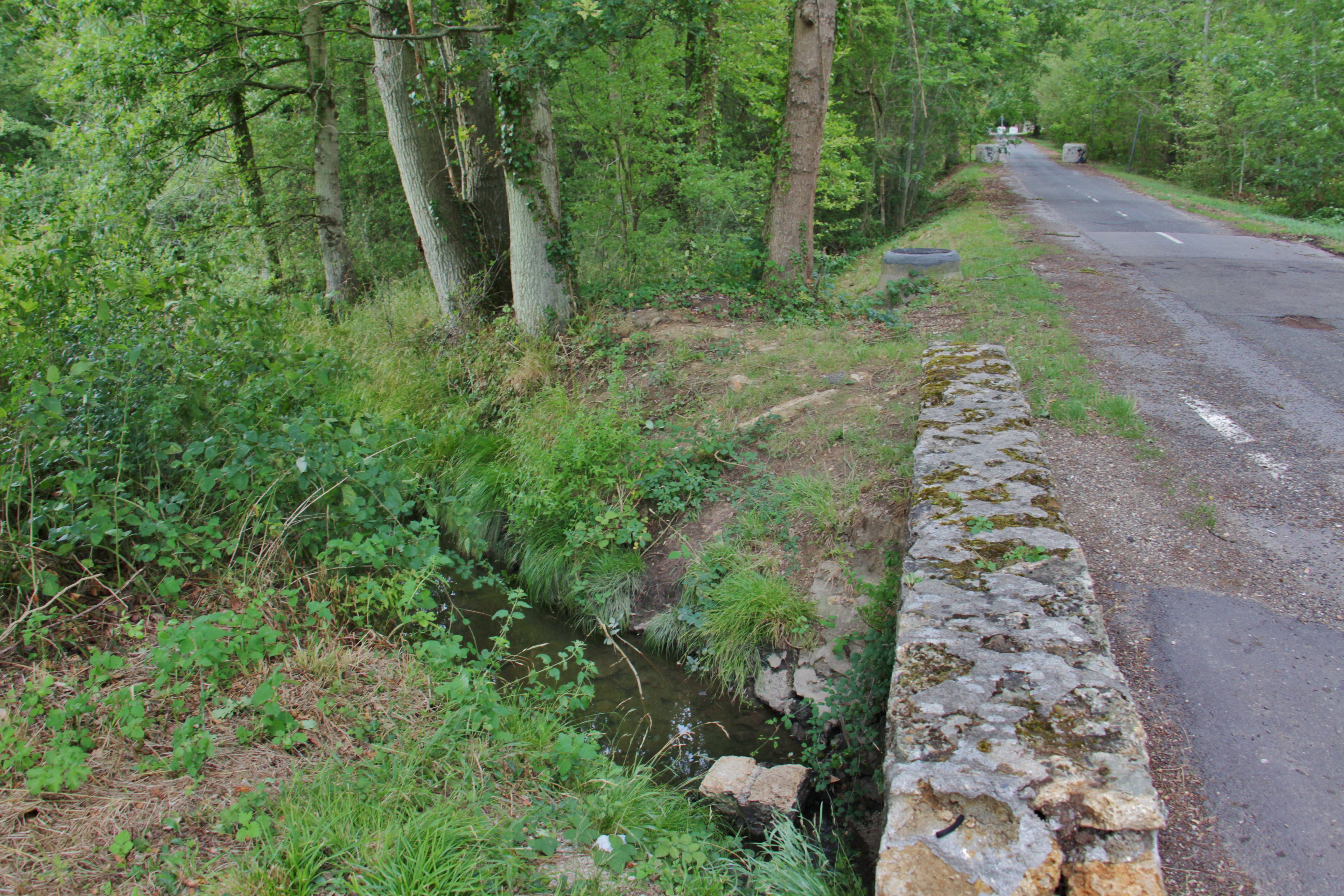 Rû de Gironde coulant au sud de la commune de Montigny-le-Bretonneux